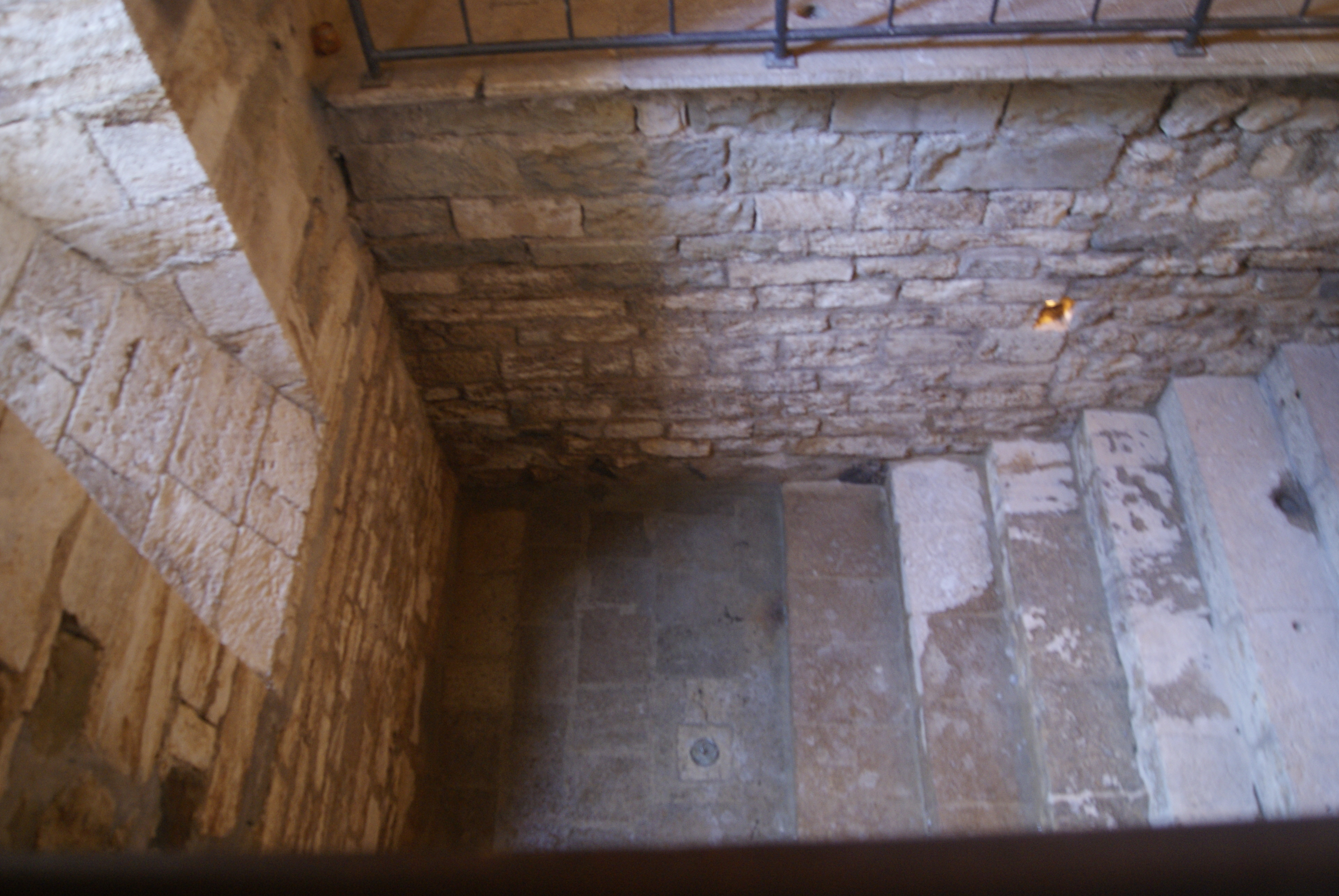 La Miqvé (Besalú)